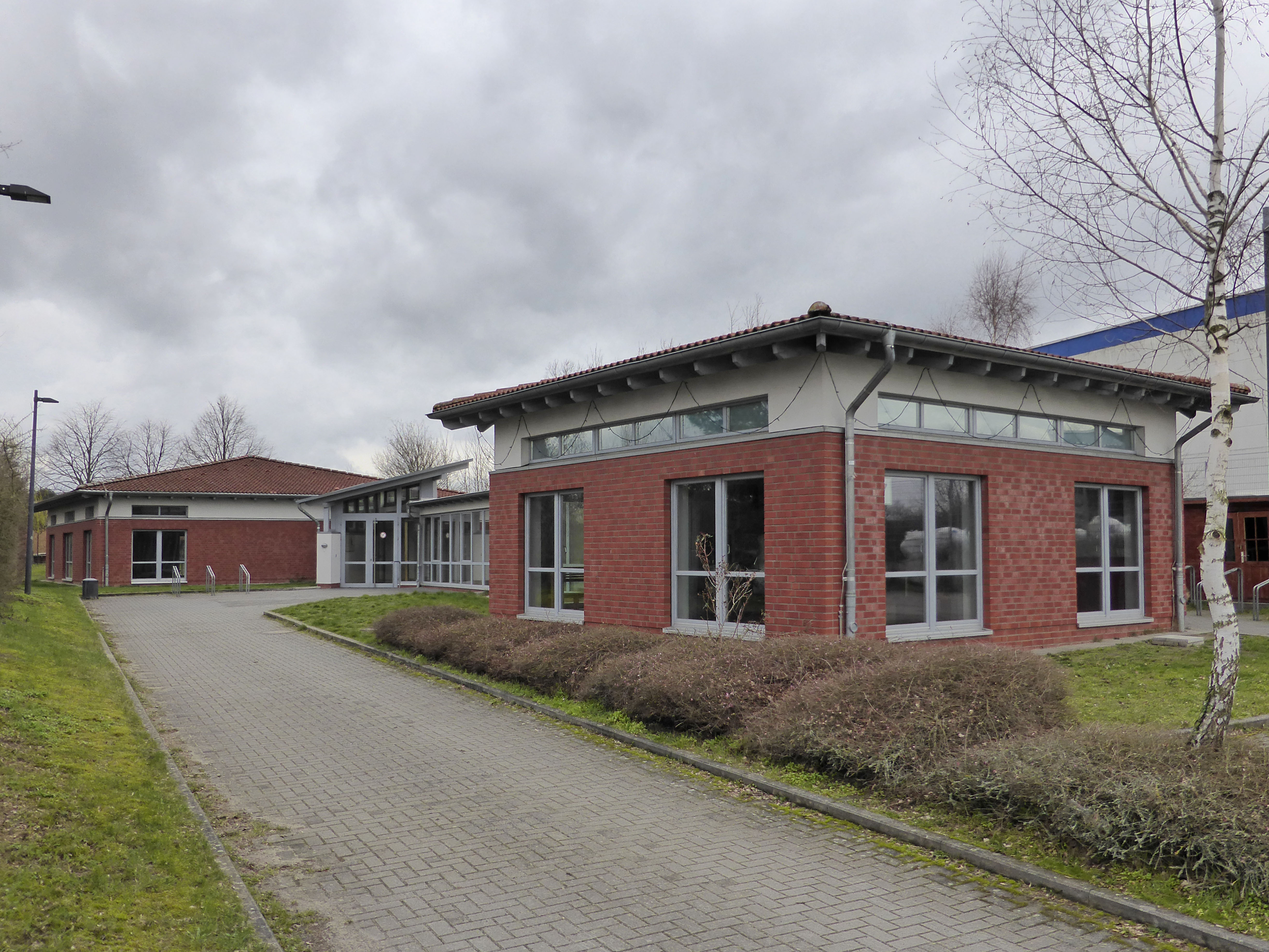 Dorfgemeinschaftshaus in Warmenau.